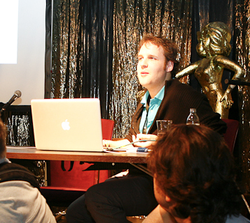 Alexander Lehmann: "Du bist Terrorist", auf der re:publica 2011, (cc) Anja Pietsch/re:publica